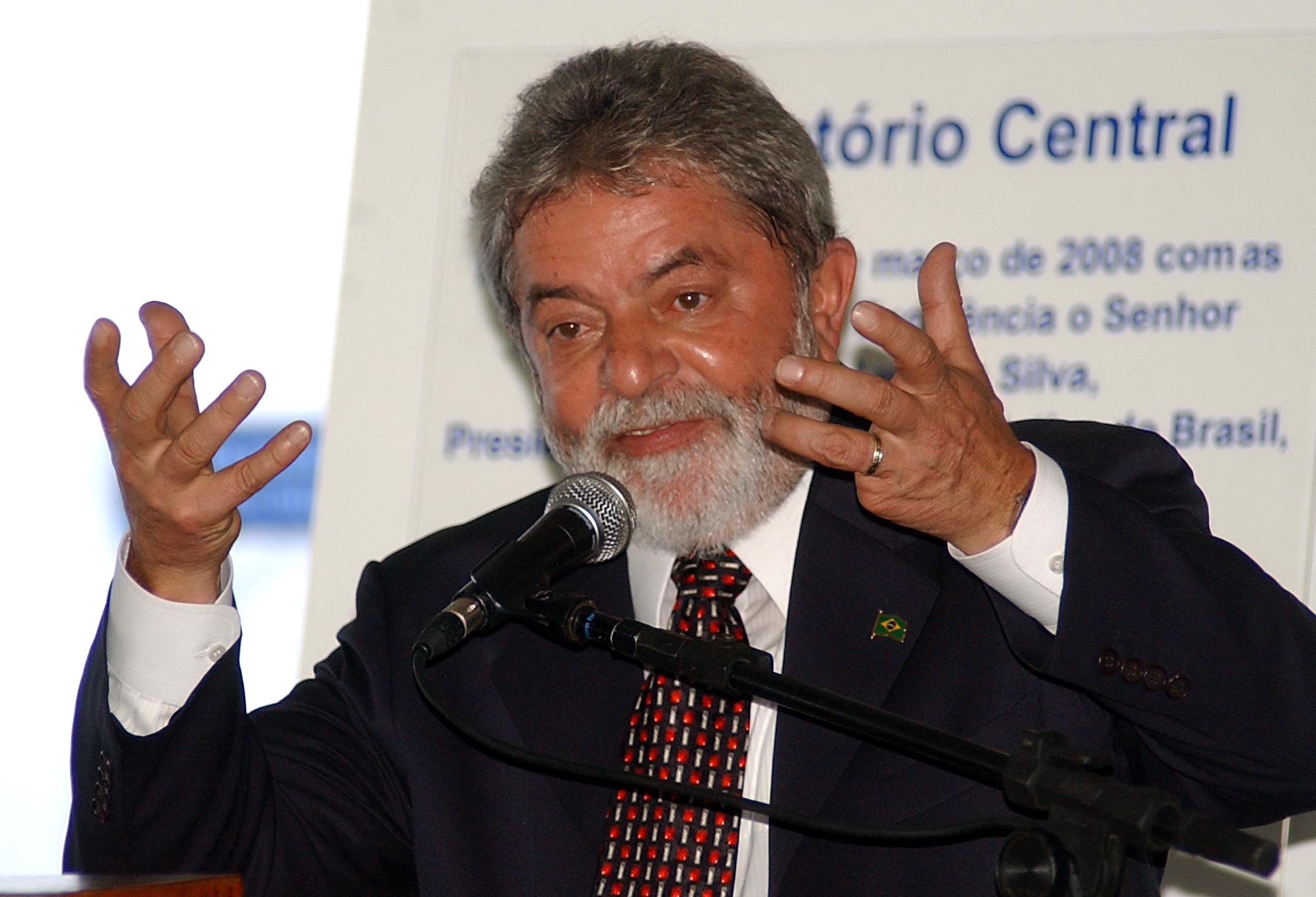 Presidente Lula discursa durante visita ao novo prédio do Instituto Materno-Infantil